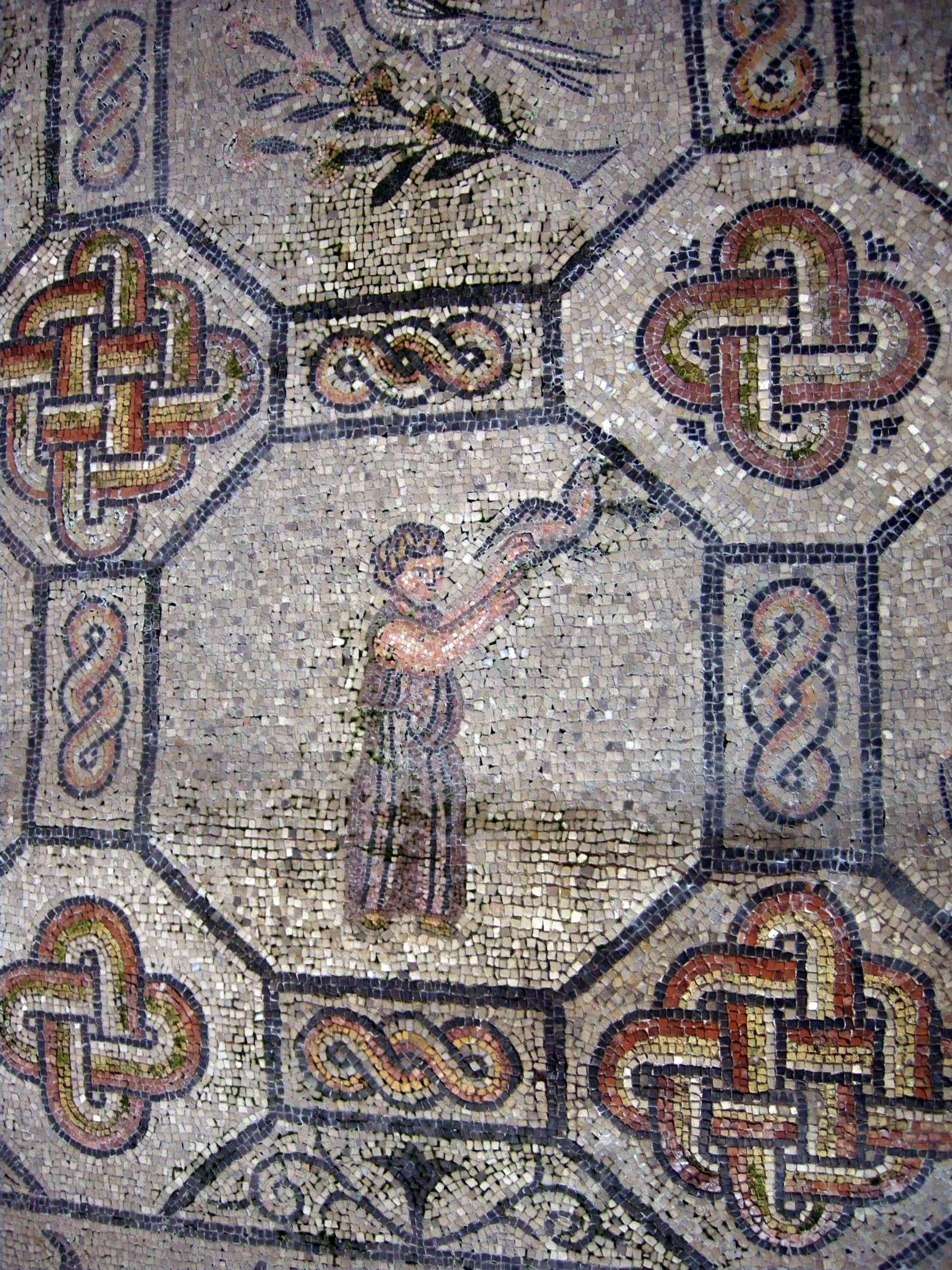 Basilica di aquilieia, mosaici, birds carpet